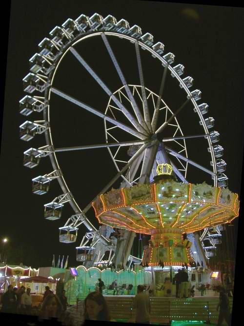 60m-Riesenrad auf dem Cannstatter Wasen